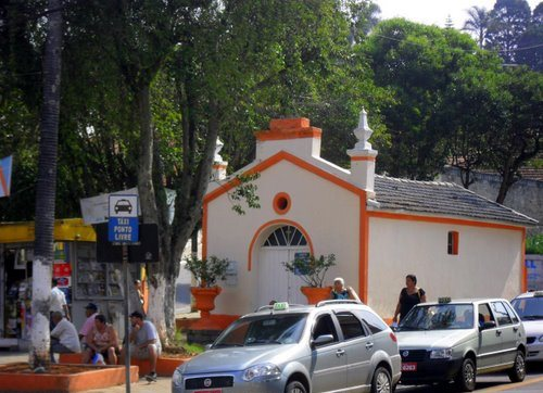 Capela Santo Antonio - Poá-SP